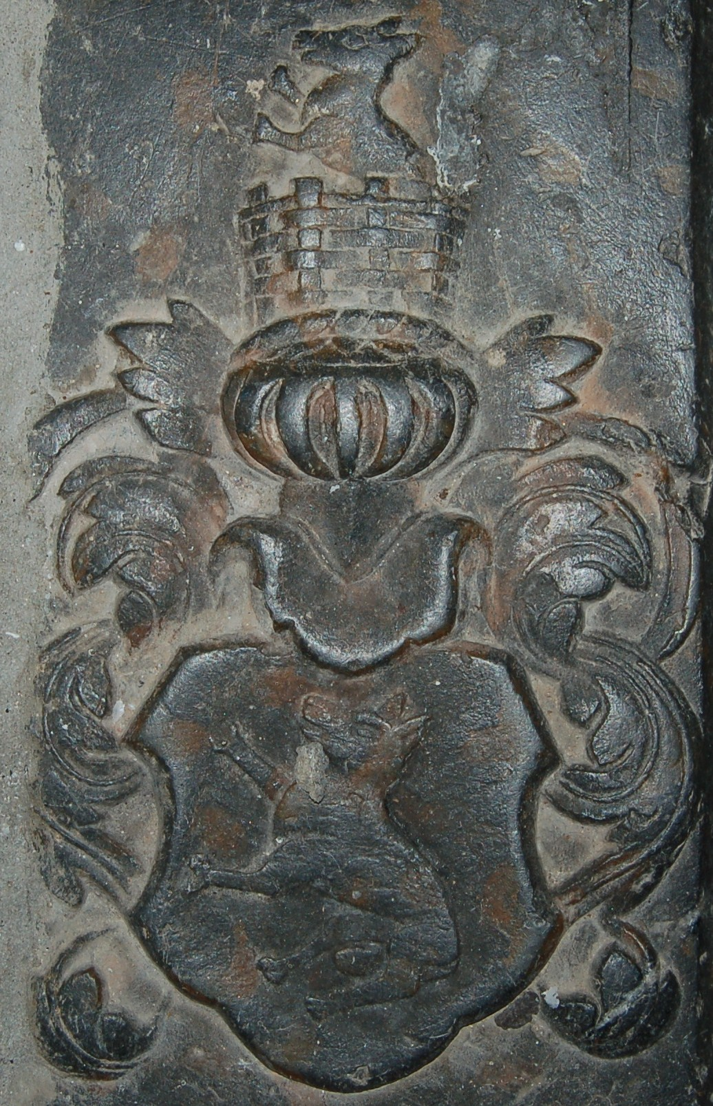 Peder til Fresje - gravstein i Hedrum kirke - slekten Wisch, Pogwisch eller Knob?